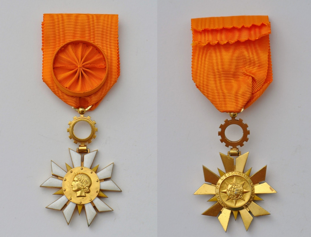 Insigne d'officier dans l'ordre de l'Économie nationale